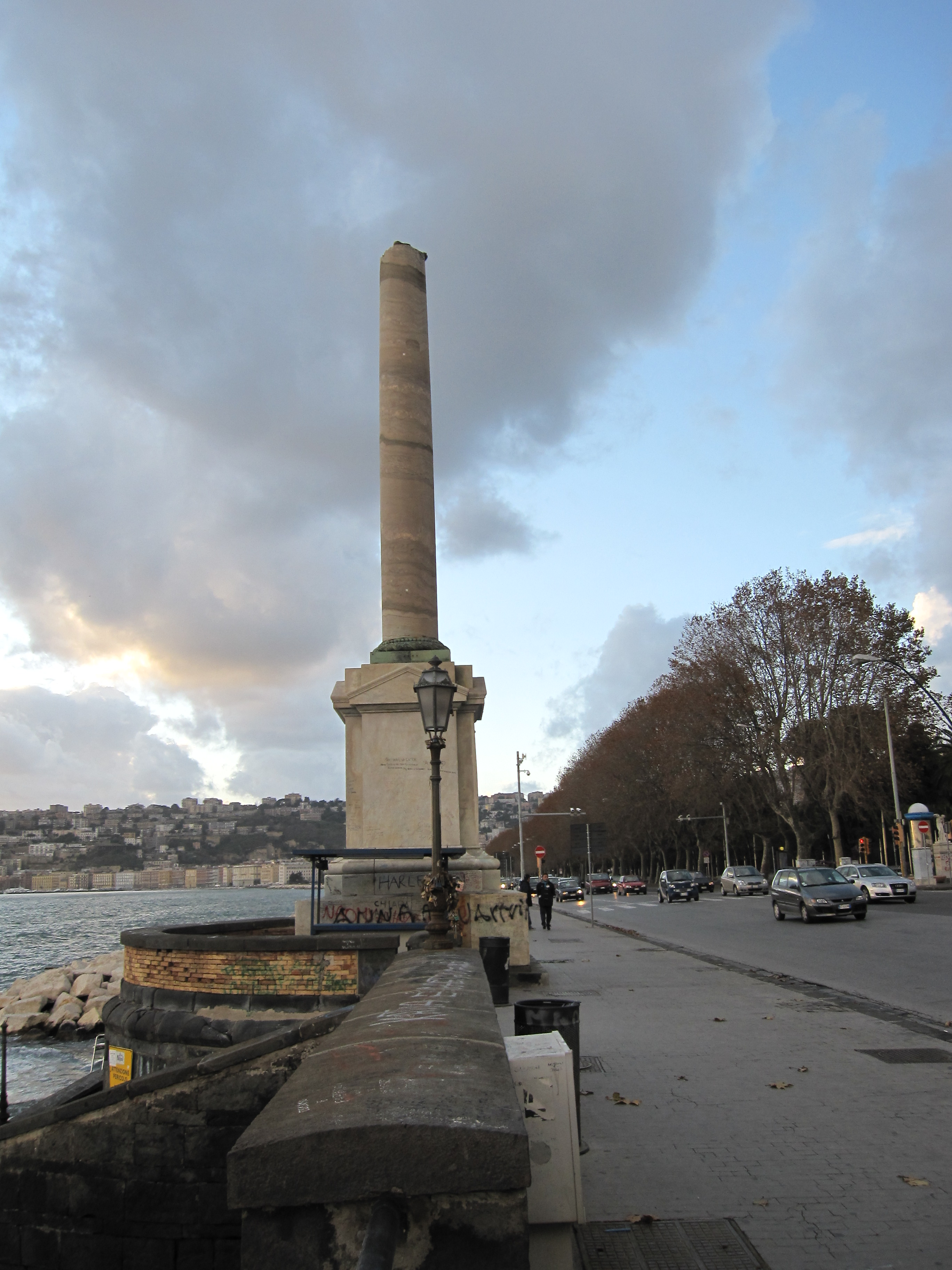 In ricordo dei caduti sul mare, la Colonna spezzata di Napoli.